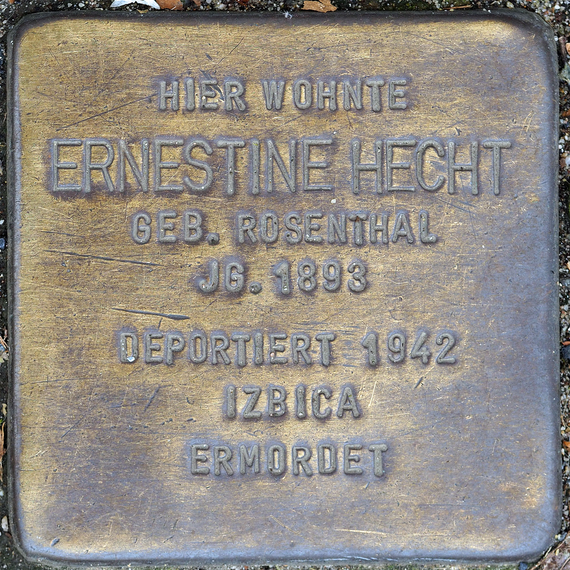 Stolpersteine MG: Hecht, Ernestine